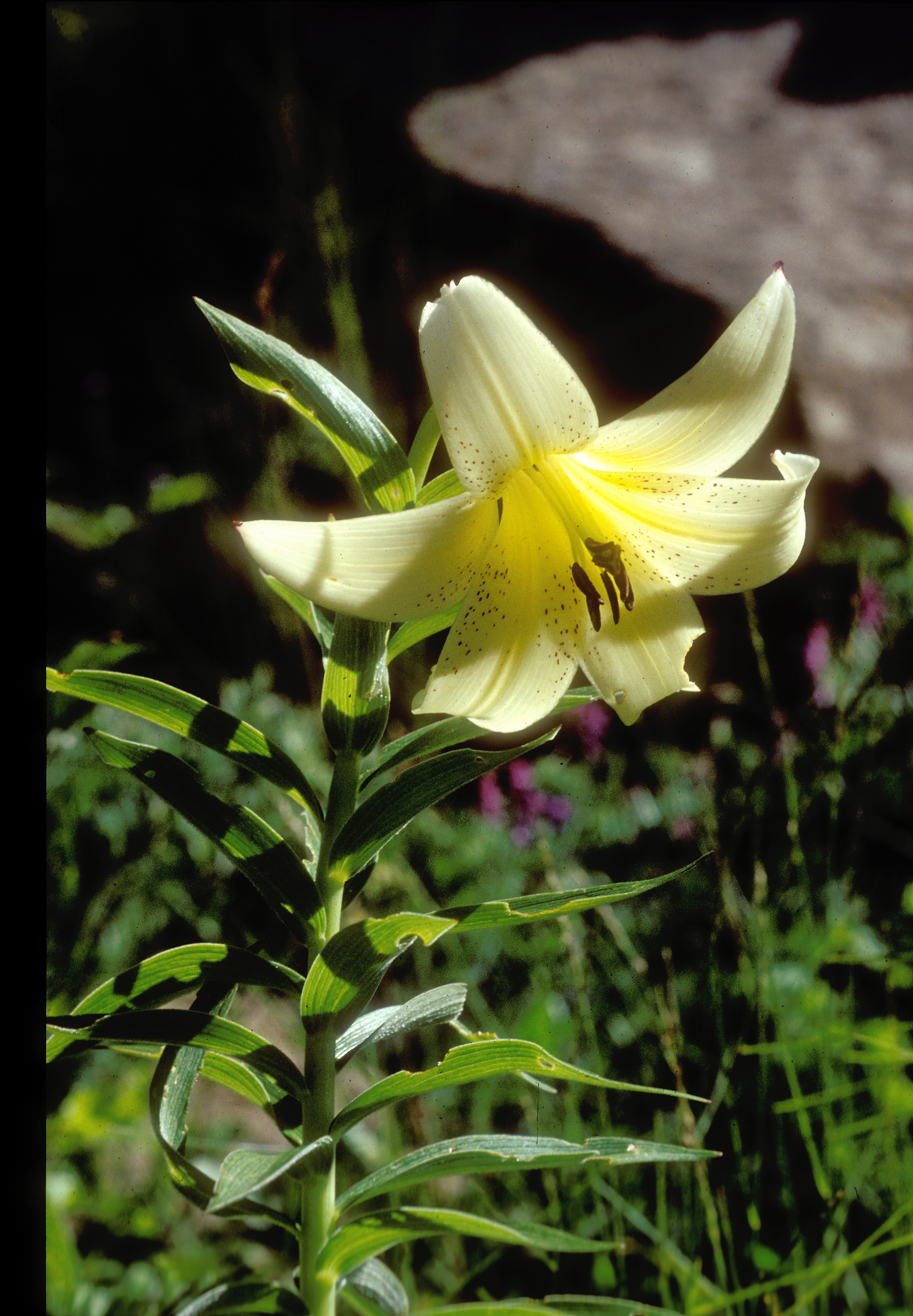 Lilium monadelphum var. armenum in habitat at Zigana Pass, Turkey